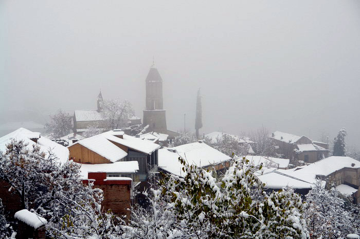 Sighnaghi